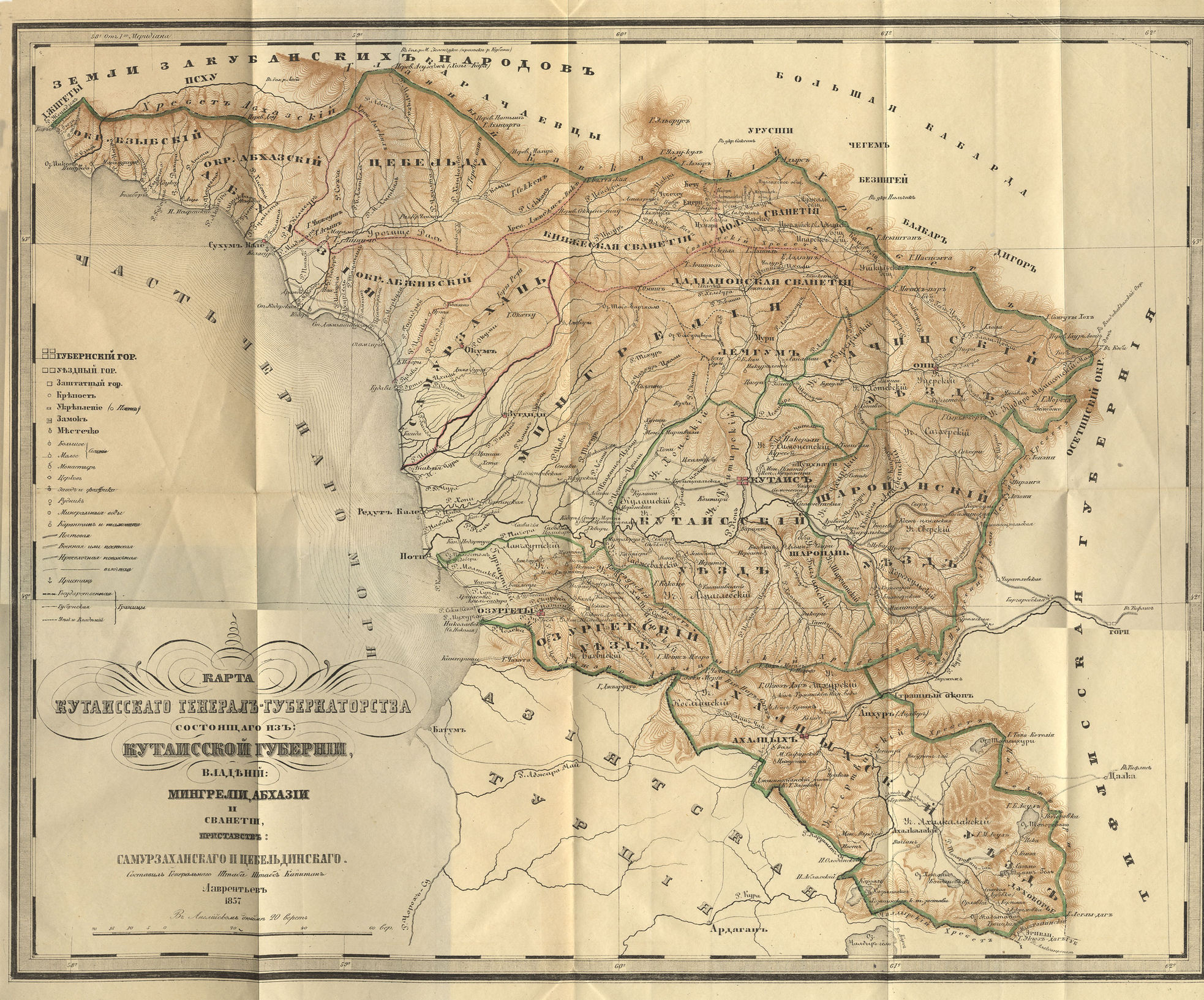 Карта Кутаисского генерал-губернаторства